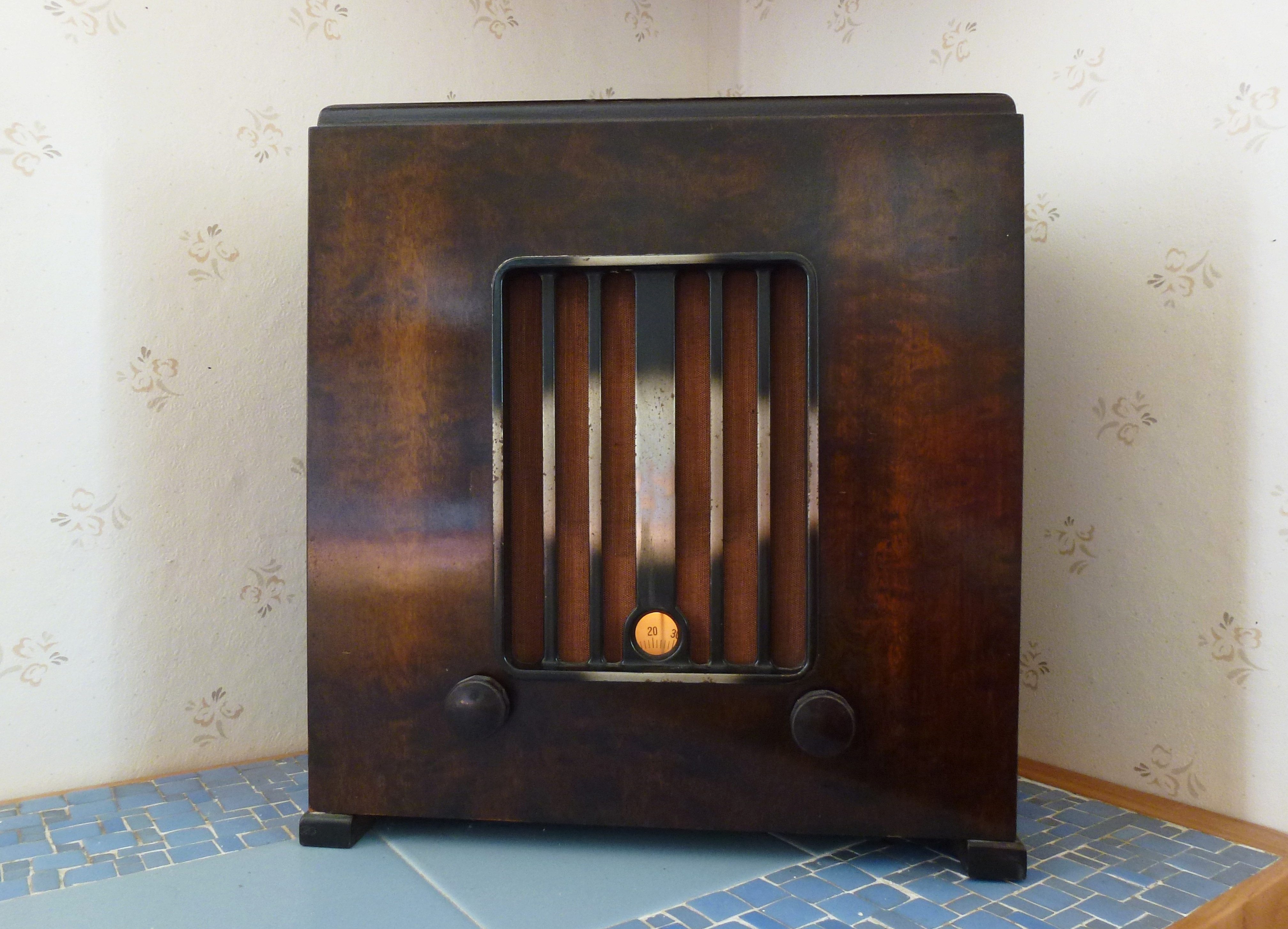 Radiola radioapparat 1930-tal